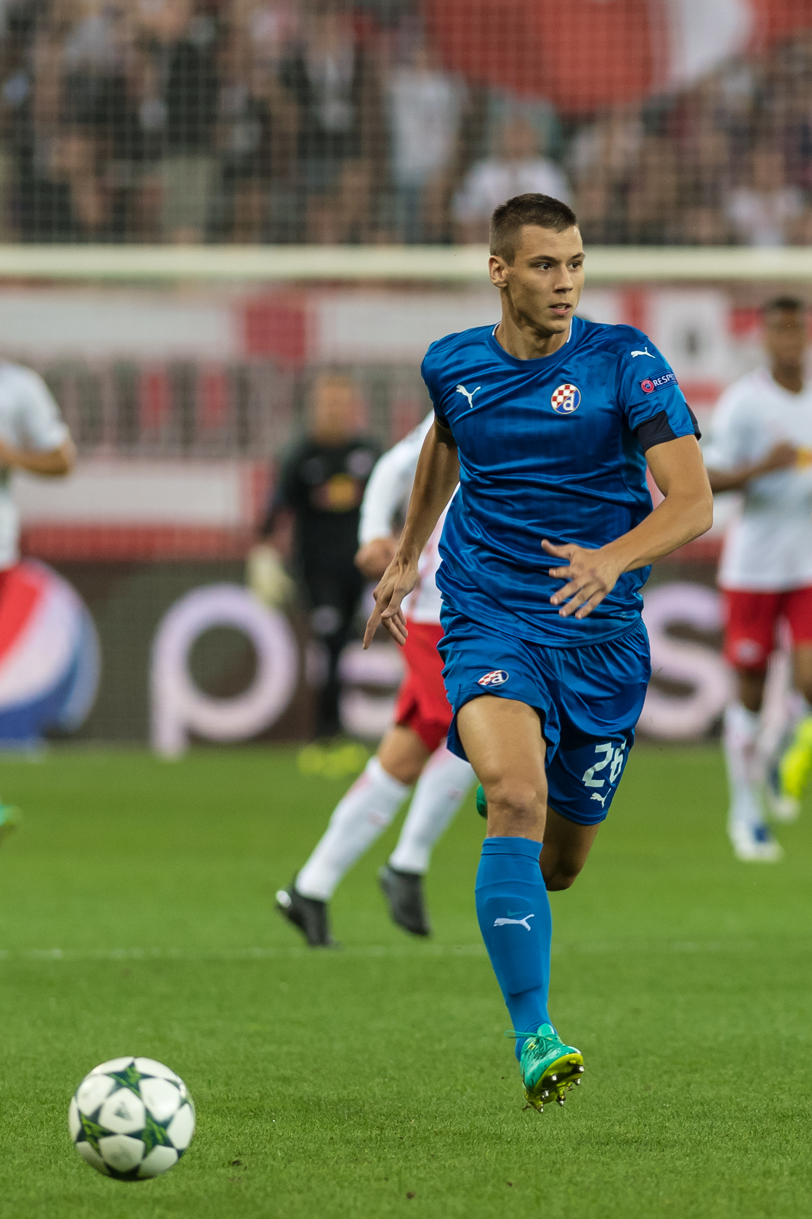 UEFA Champions League - Play-Offs - FC Salzburg vs Dinamo Zagreb. Bild zeigt Filip Benkovic (Dinamo Zagreb).